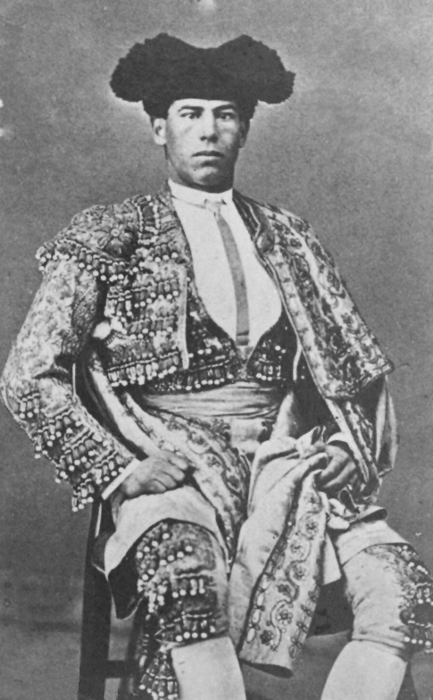 Salvador Sánchez Povedano "Frascuelo", bullfighter, died in 1898